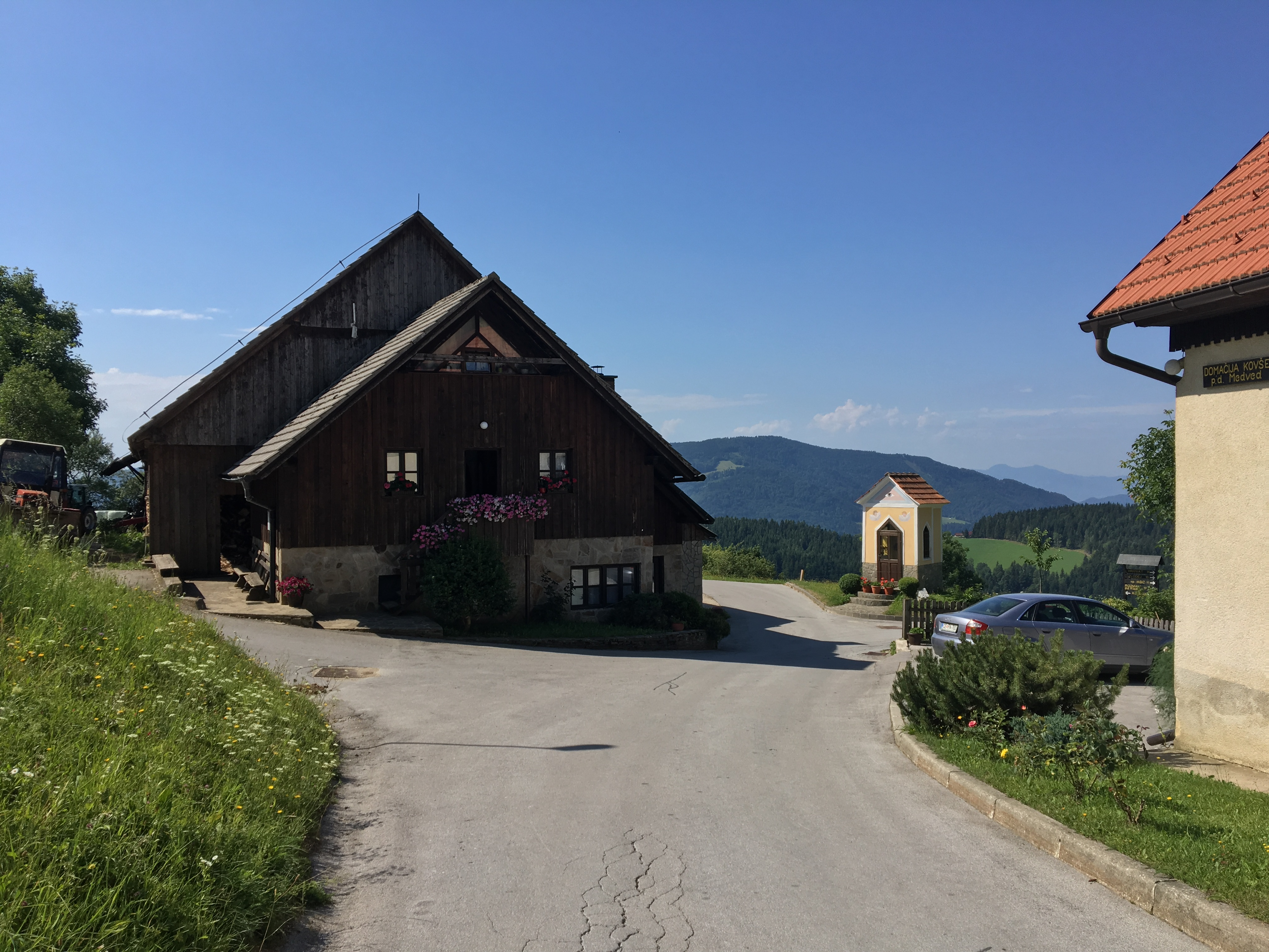 Hlavní ulice v horské vesnici Skomarje ve Slovinsku.